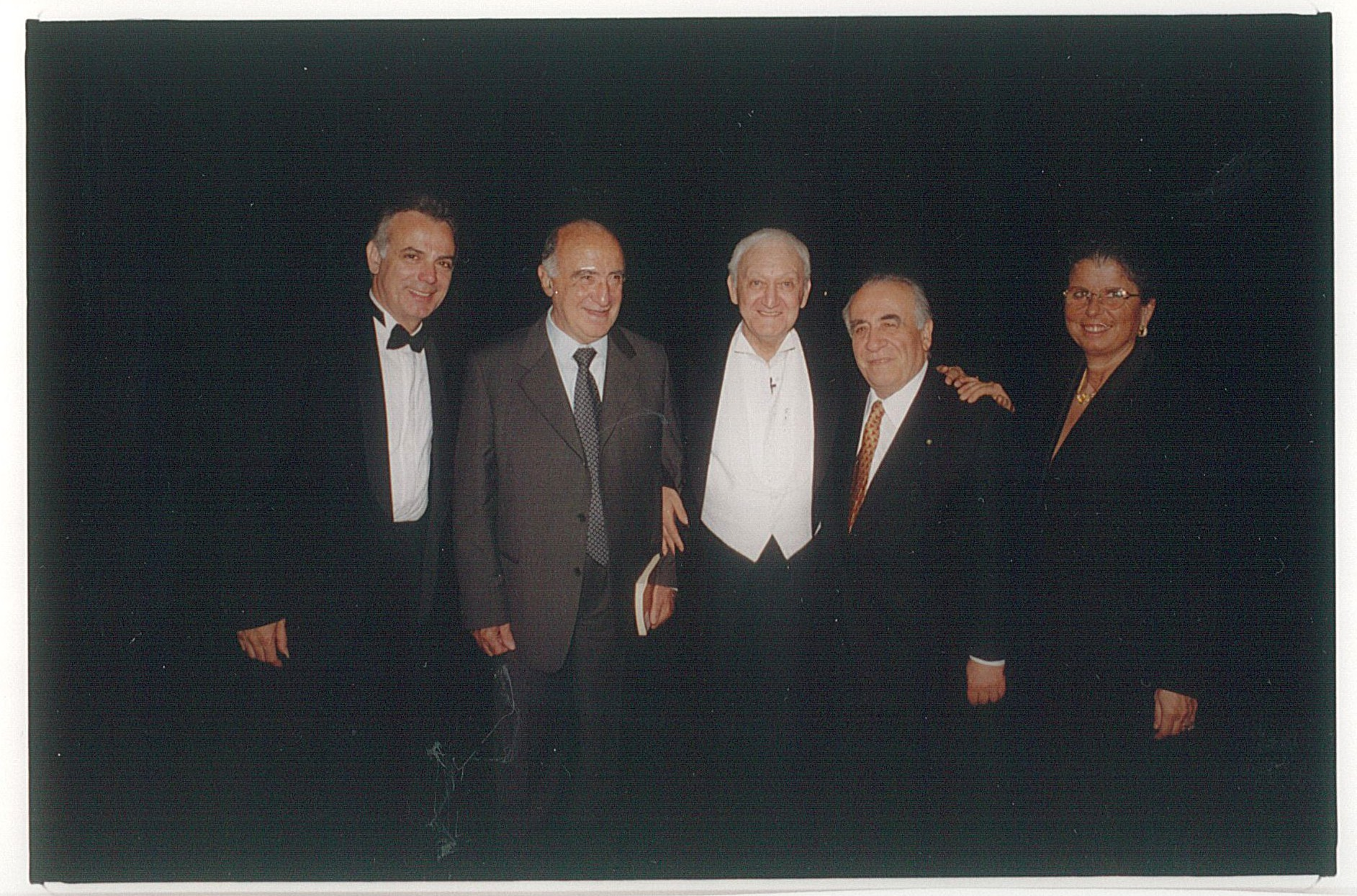 Fiorenzo Fiorentini insieme all'allora presidente dell'AS ROMA Franco Sensi (anno 2000)